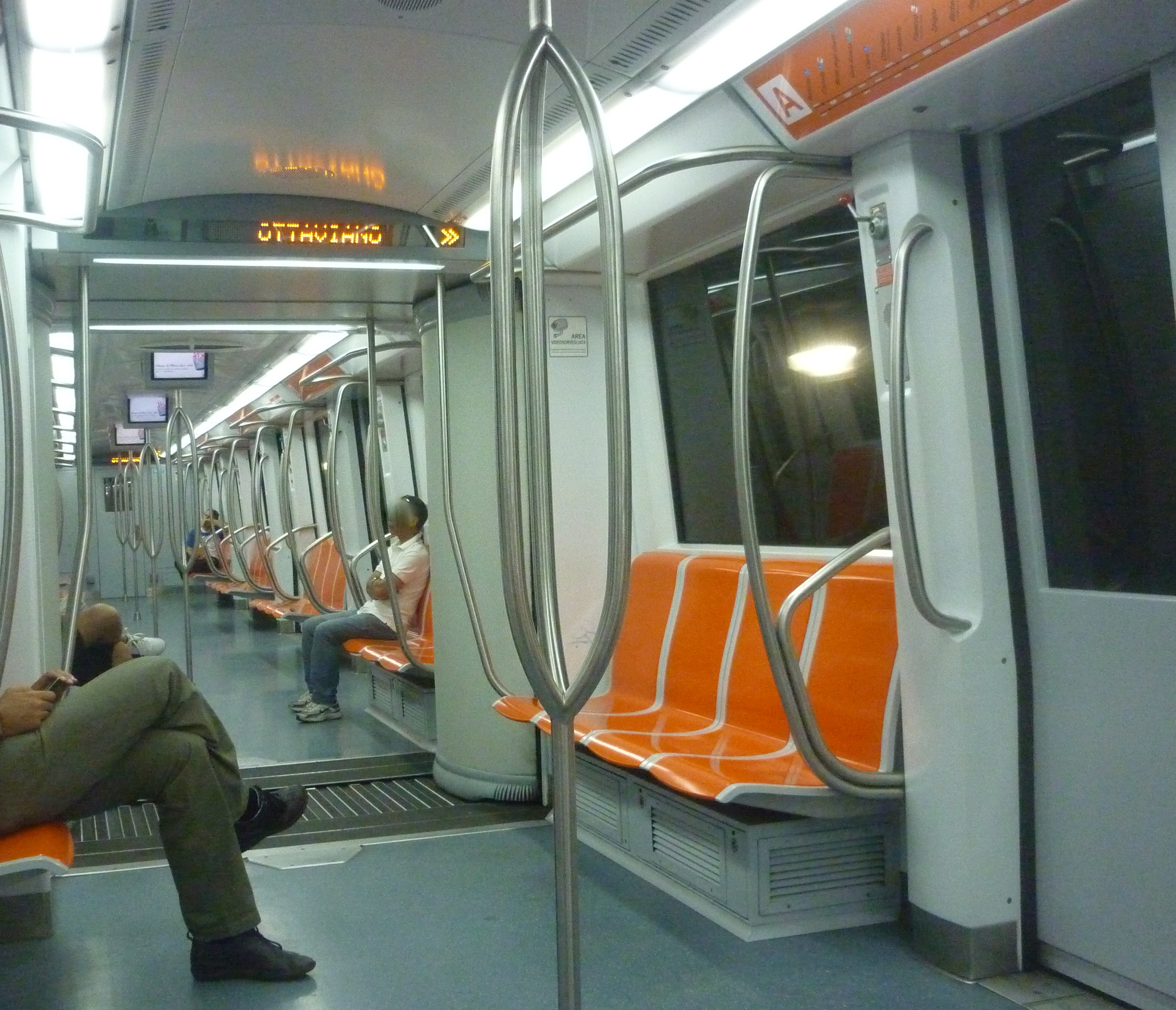 Interno del treno S 300 della Metro A di Roma Licensing